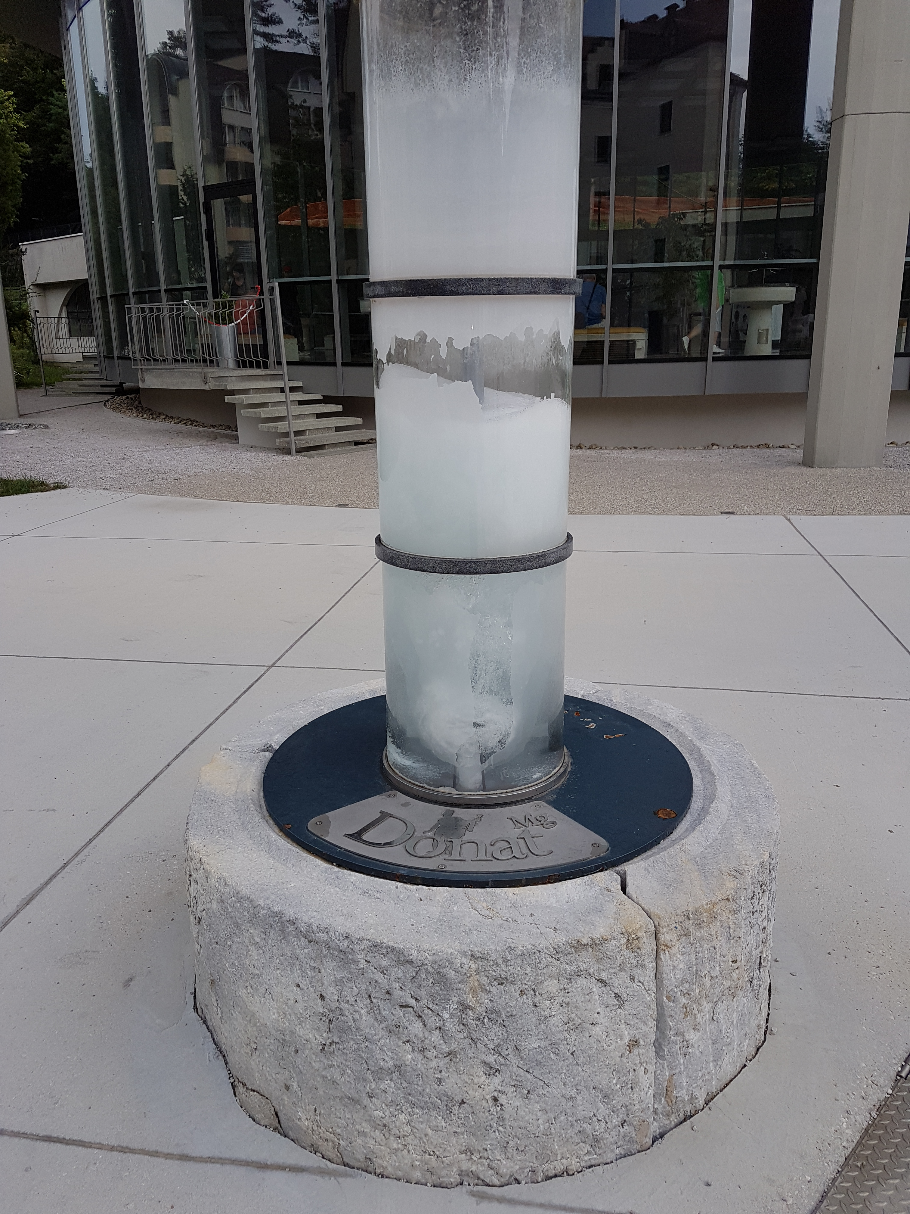 Бювет минеральной воды Donat Mg в Рогашке Слатине